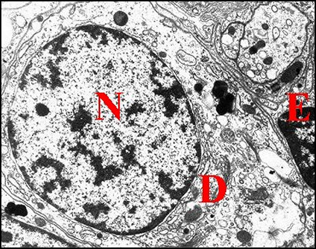 L'un des deux neurones d'une lyrifissure d'organe sus-pédiculaire en bourrelet vu au microscope électronique à transmission